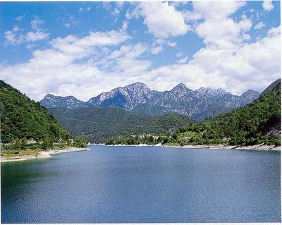 Lago di Redona presso Tramonti di Sotto. Foro tratta dalla wikipedia in lingua friulana it::fur:Figure:redone.jpg